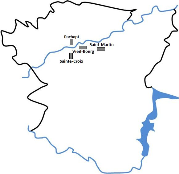 Vitré au Xe siècle